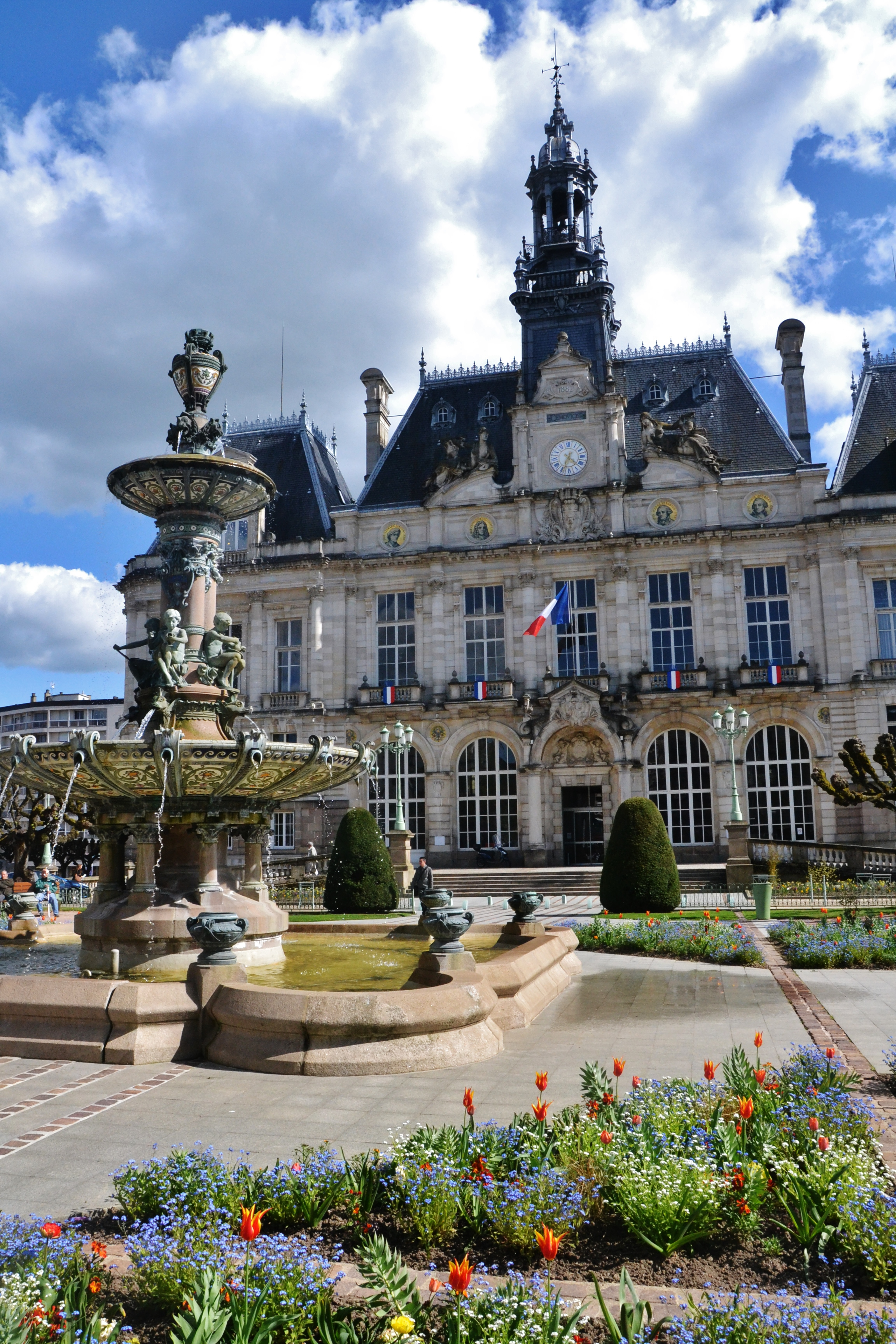 Hôtel de ville et fontaine de porcelaine, Limoges (Haute-Vienne, France)